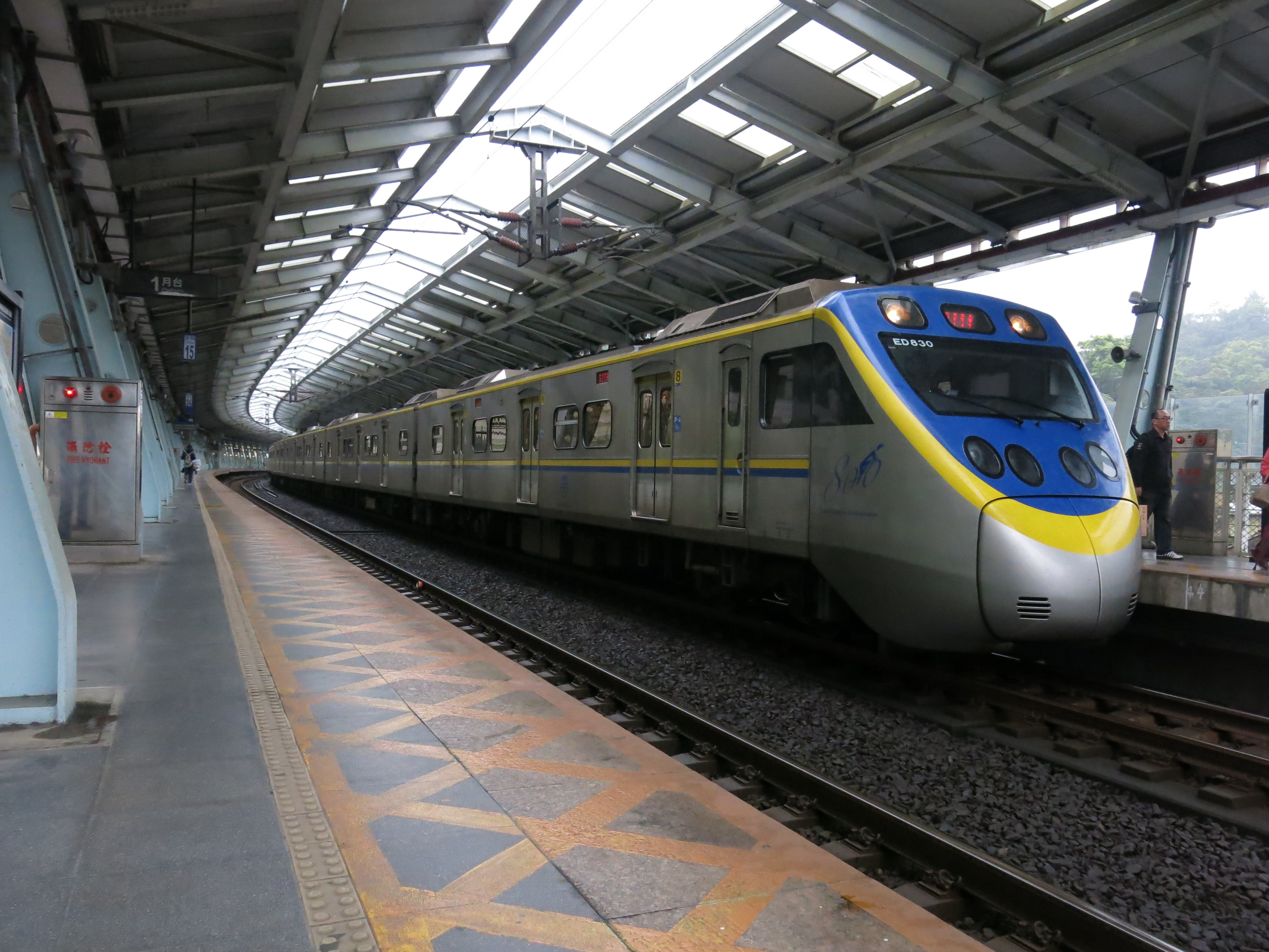 中文（台灣）: 臺灣鐵路管理局電聯車EMU830，停靠汐科車站第二月台。